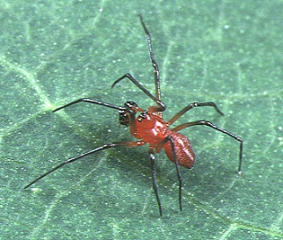 male Nematogmus sanguinolentus from Okinawa.